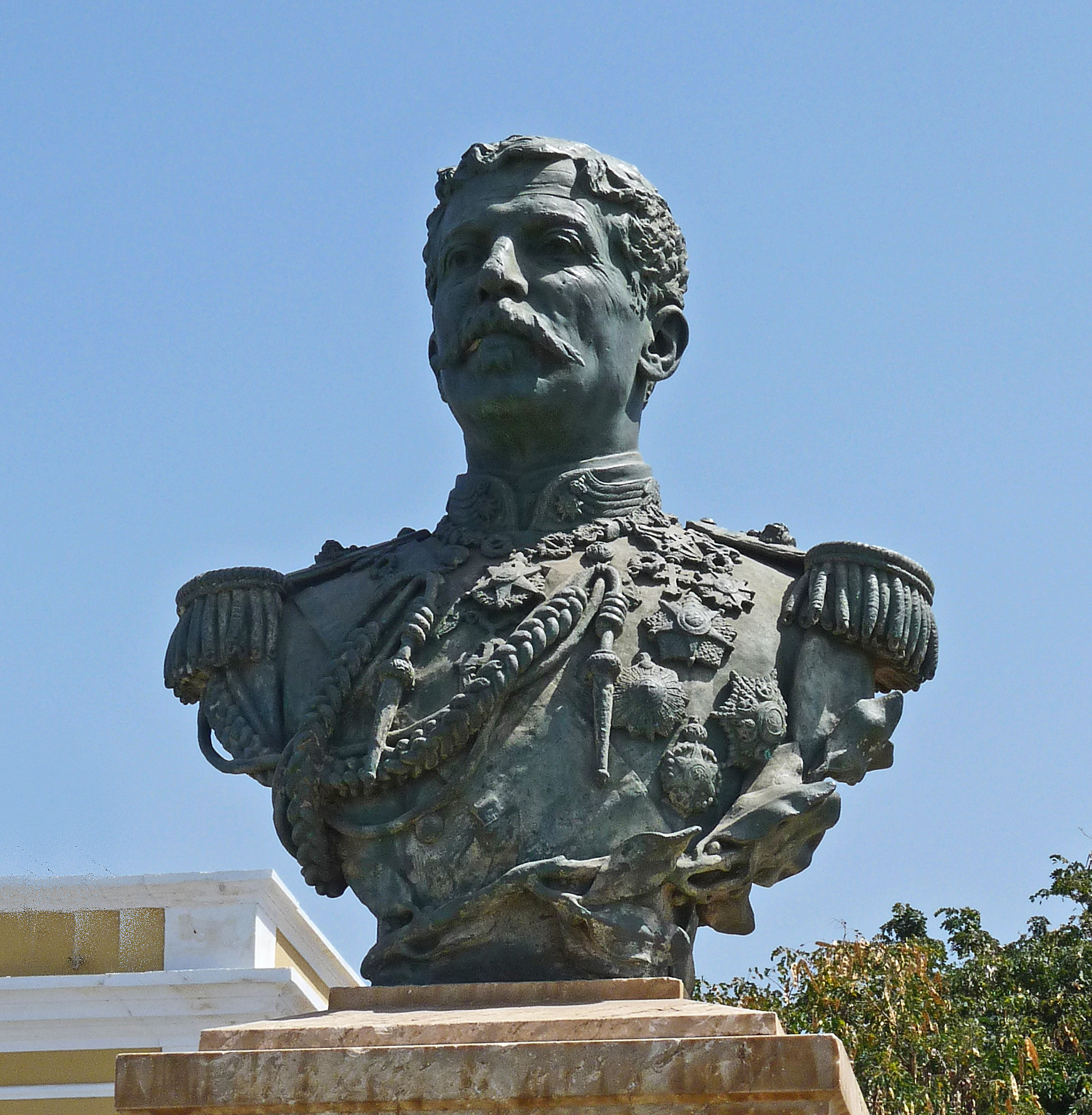 São Filipe (île de Fogo, Cap-Vert) : monument à la mémoire d'Alexandre de Serpa Pinto, gouverneur du Cap-Vert de 1894 à 1897